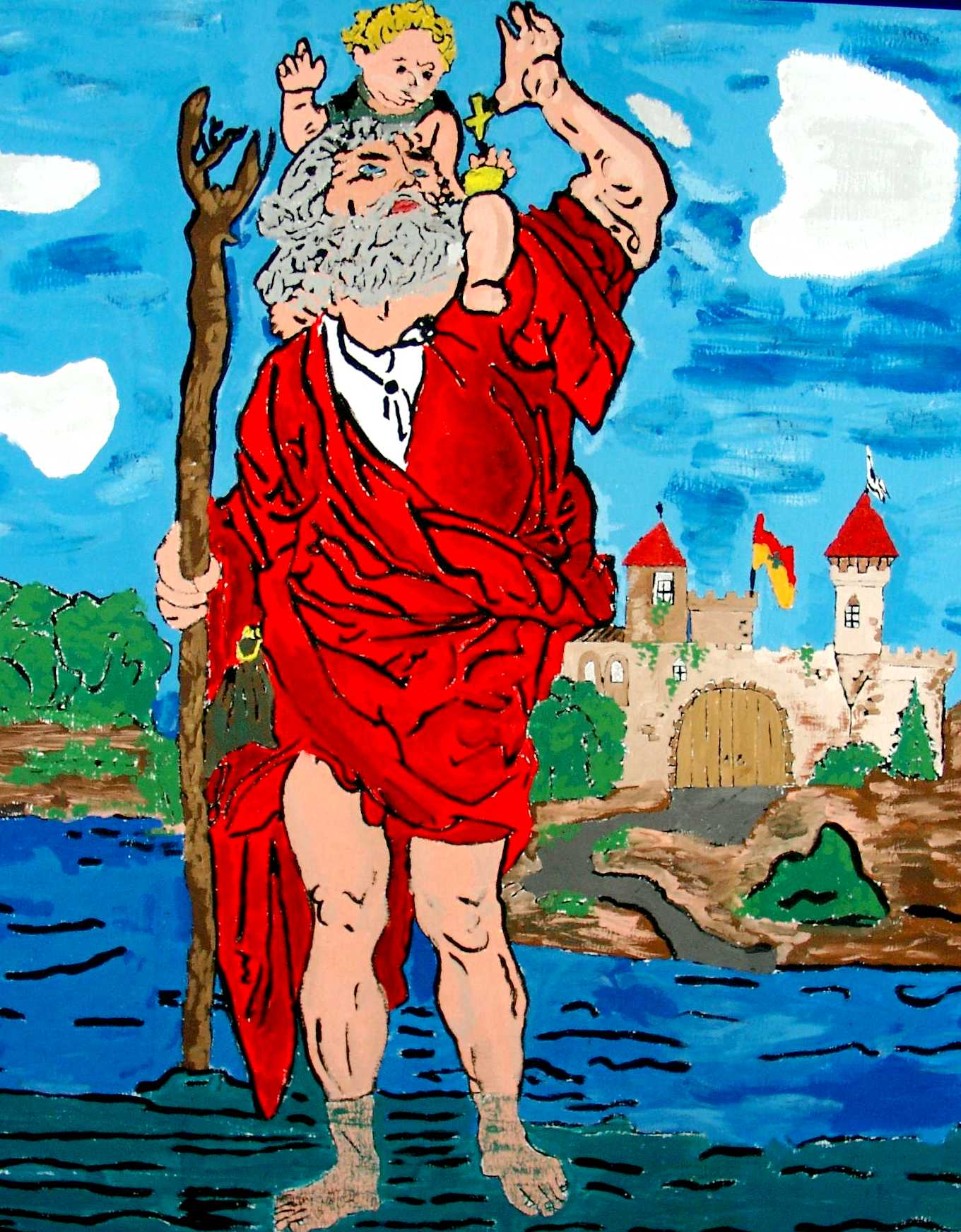 Christophorusabbildung im CJD Königswinter, B-Gebäude